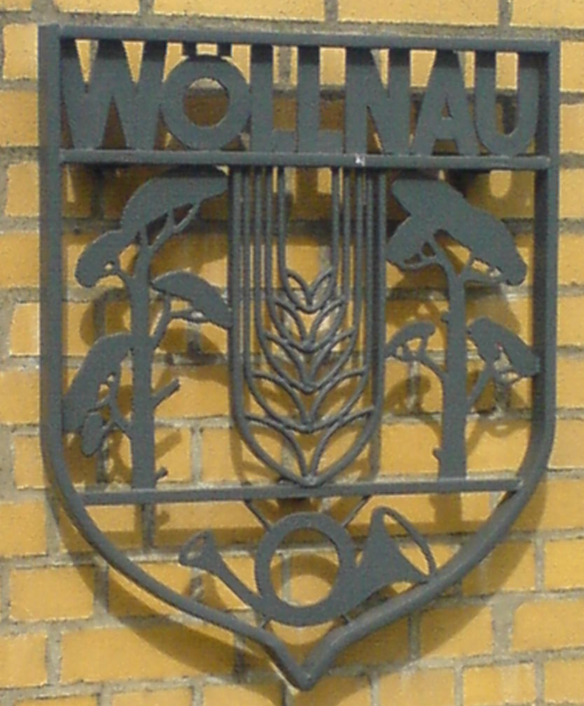 Wöllnauer Wappen